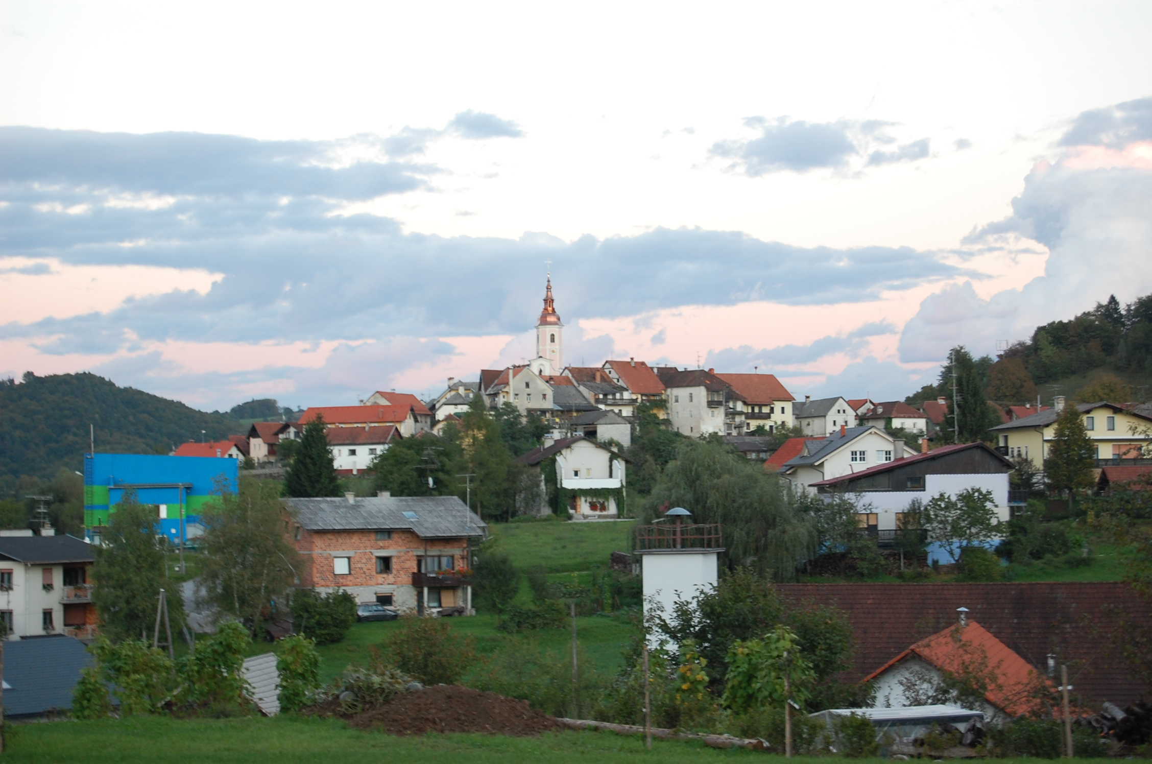 Visnja Gora town